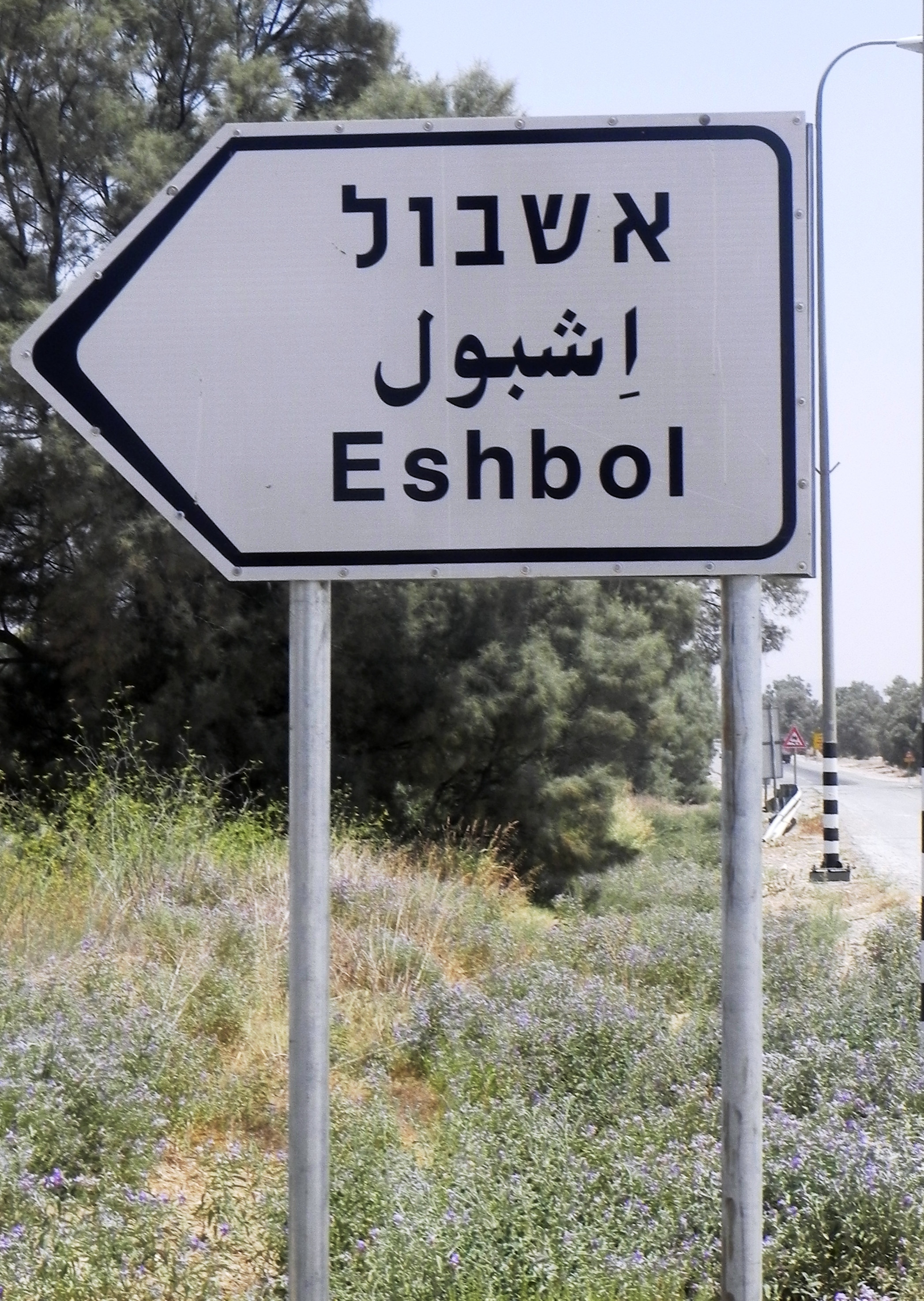 אשבול שלט הכניסה למושב